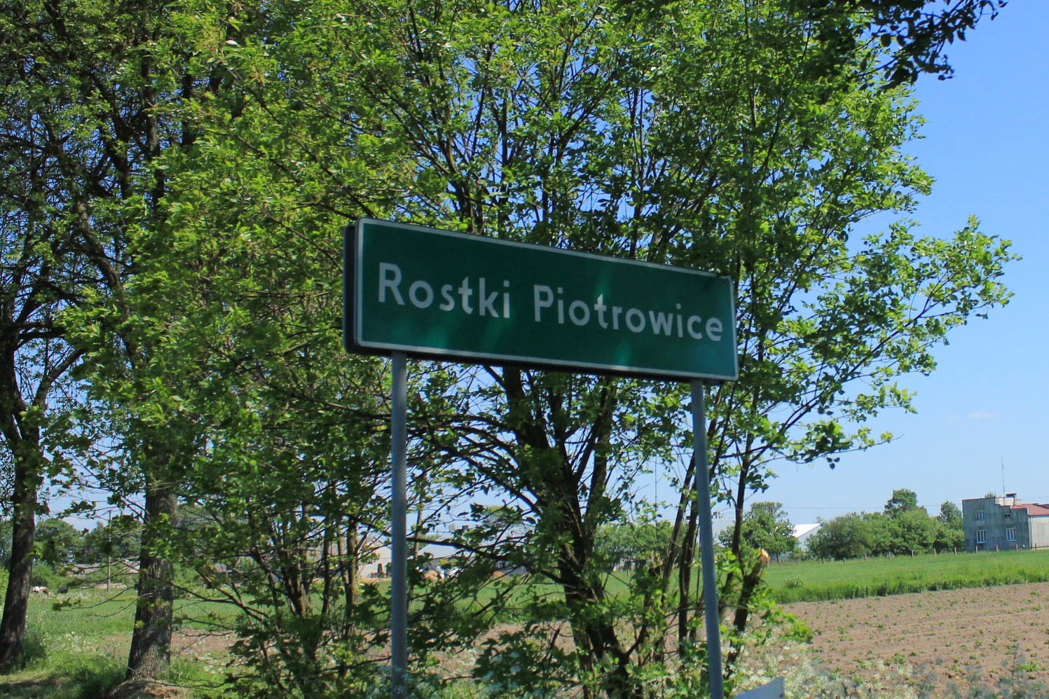 Rostki-Piotrowice - wieś w Polsce położona w województwie mazowieckim, w powiecie ostrowskim, w gminie Małkinia Górna.